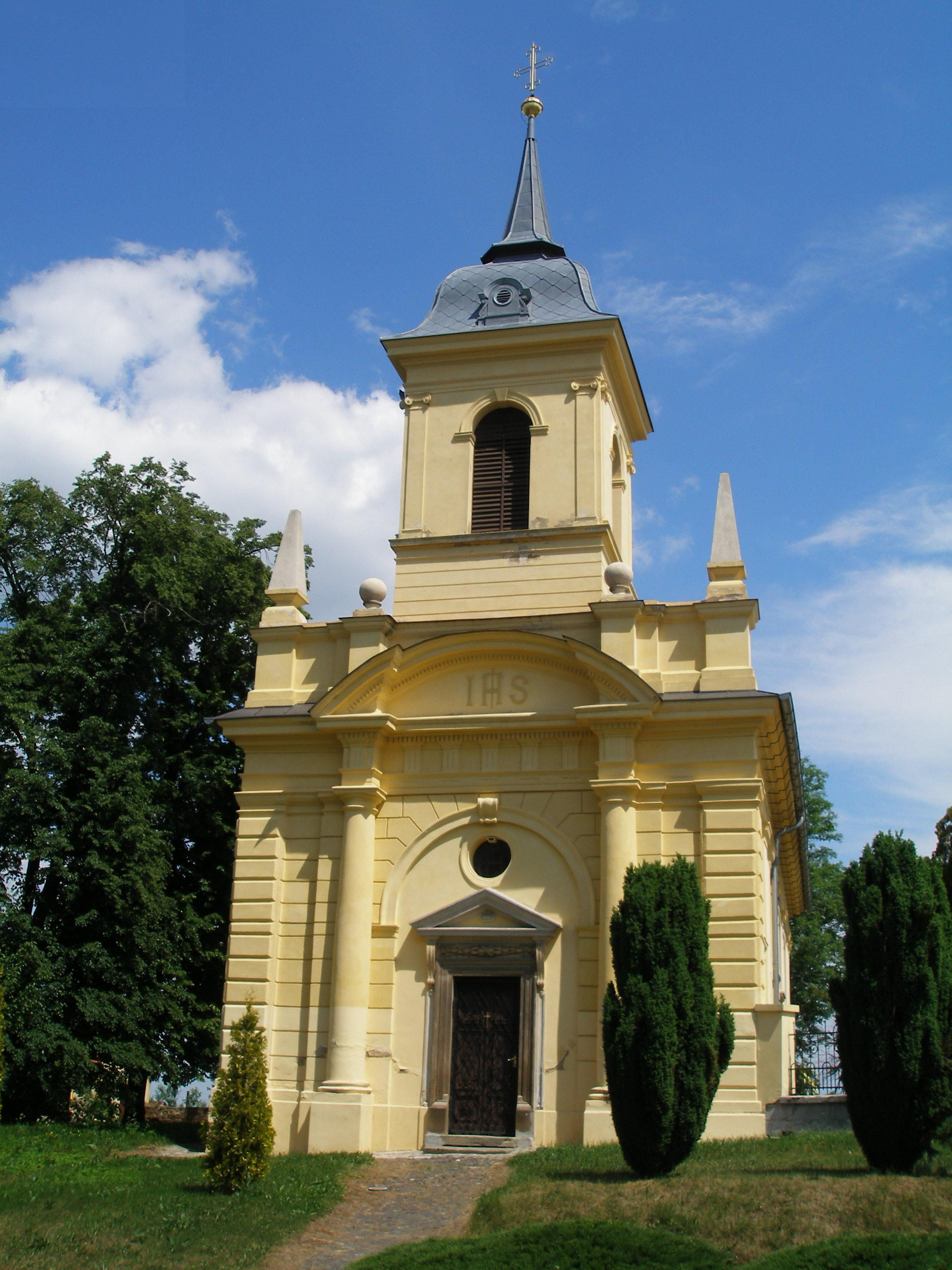 Kostel svatého Václava v Hobšovicích.